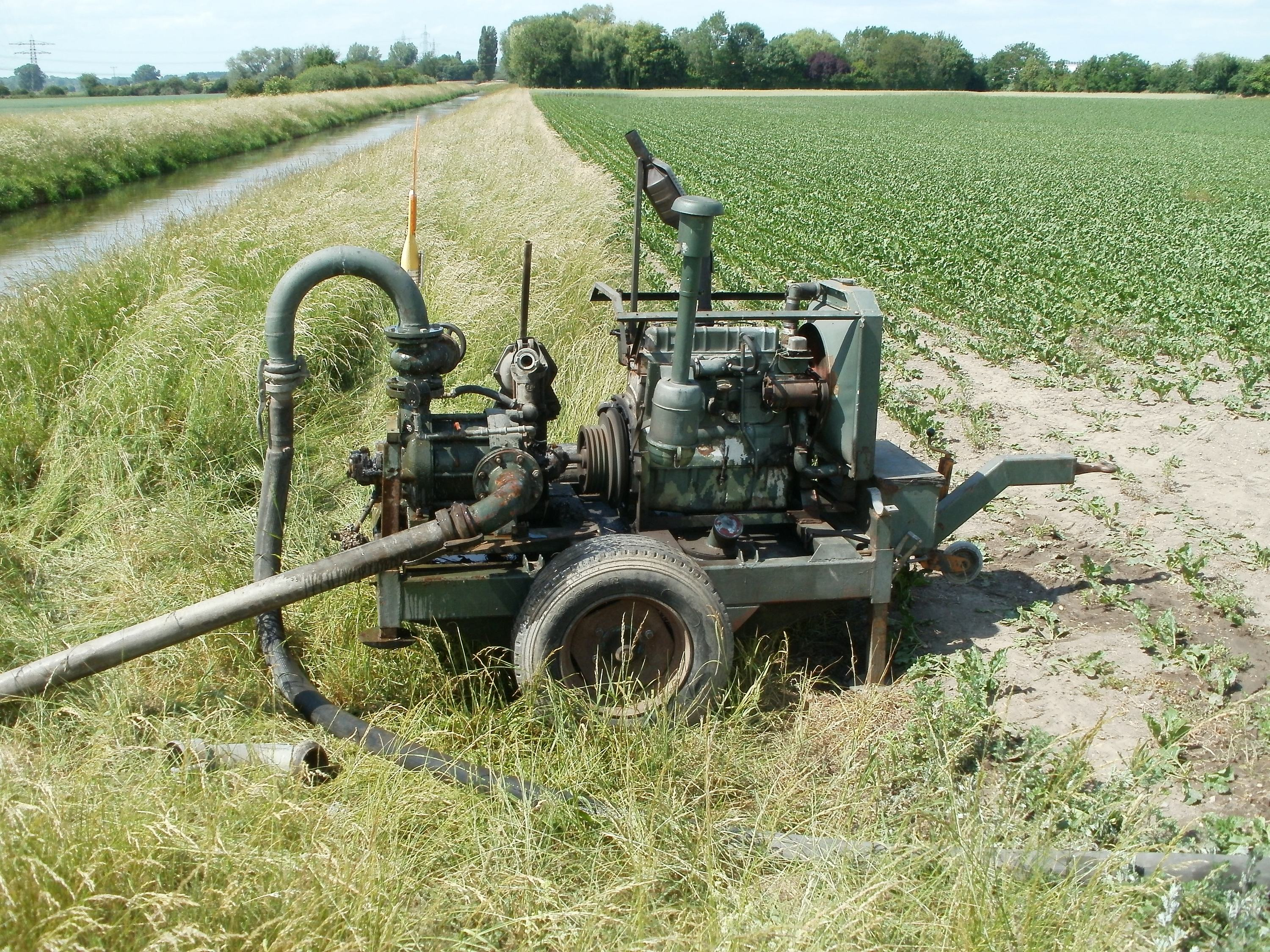 Wasserpumpe zur Feldbewässerung in Hockenheim-Talhaus